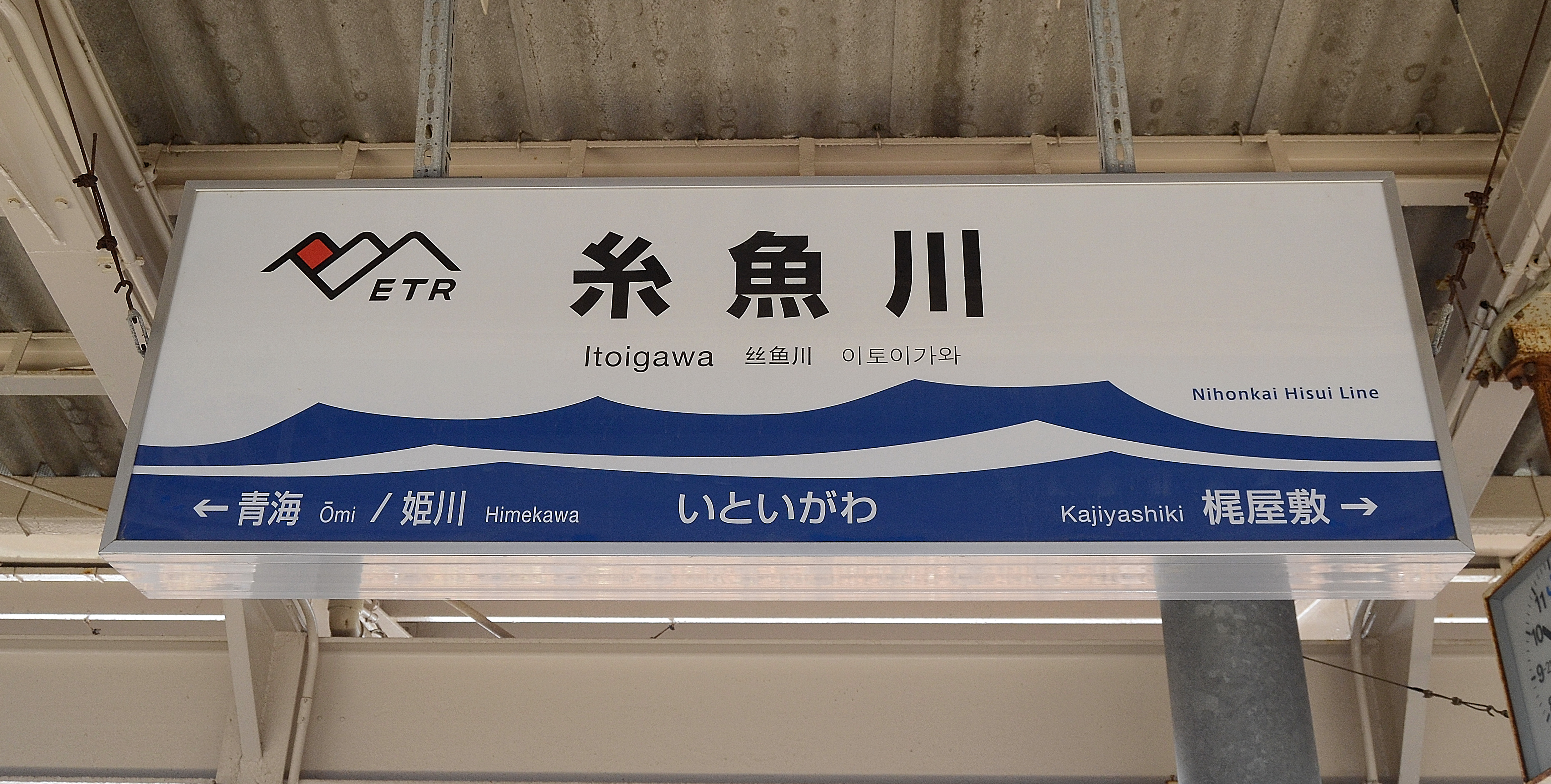 えちごトキめき鉄道、日本海ひすいラインの駅名票。